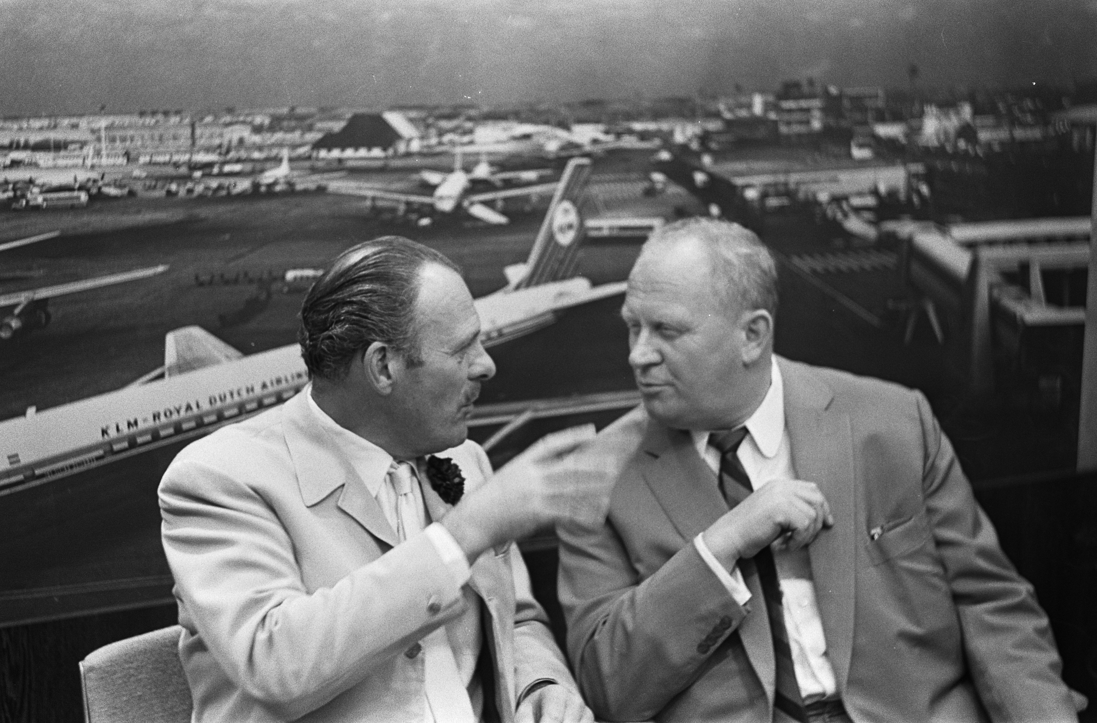 Collectie / Archief : Fotocollectie Anefo Reportage / Serie : [ onbekend ] Beschrijving : Premiere van de film "Knotsgekke kerels in hun vliegende kratten" (Engelse titel "Those Magnificent Men in Their Flying Machines") in Nederland. Terry Thomas en Gert Fröbe (rechts) tijdens persconferentie op Schiphol Datum : 15 juli 1965 Locatie : Noord-Holland, Schiphol Trefwoorden : acteurs, filmsterren, persconferenties Persoonsnaam : Fröbe Gert, Thomas, Terry Fotograaf : Koch, Eric / Anefo Auteursrechthebbende : Nationaal Archief Materiaalsoort : Negatief (zwart/wit) Nummer archiefinventaris : bekijk toegang 2.24.01.05 Bestanddeelnummer : 917-9690